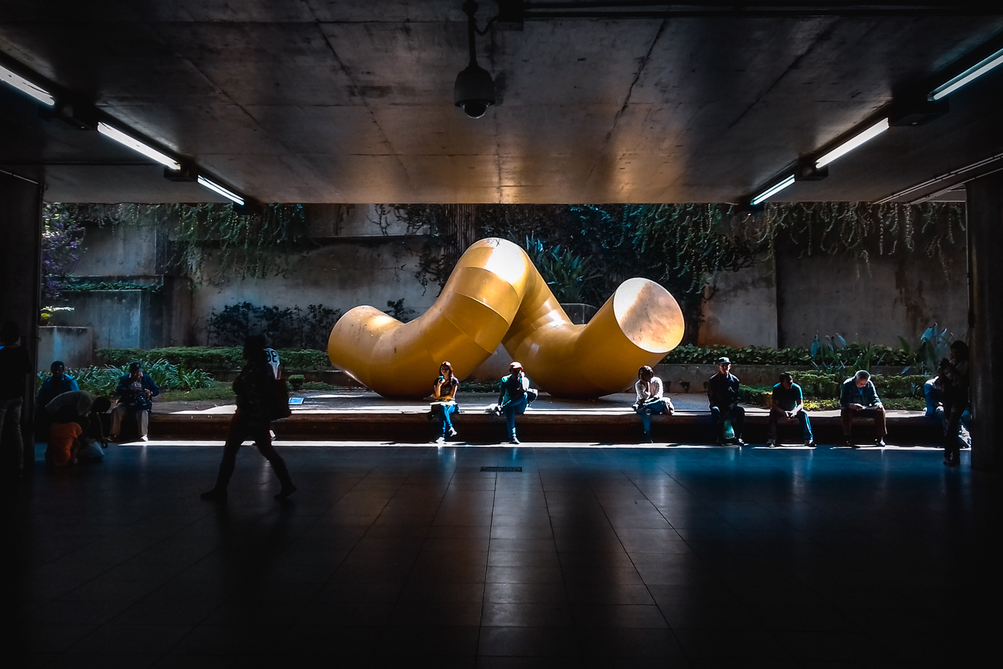 Estação Sé, São Paulo, SP, Brasil. 08 de agosto de 2017. Foto por Paulisson Miura. Facebook / Instagram " Tumblr] " Twitter]